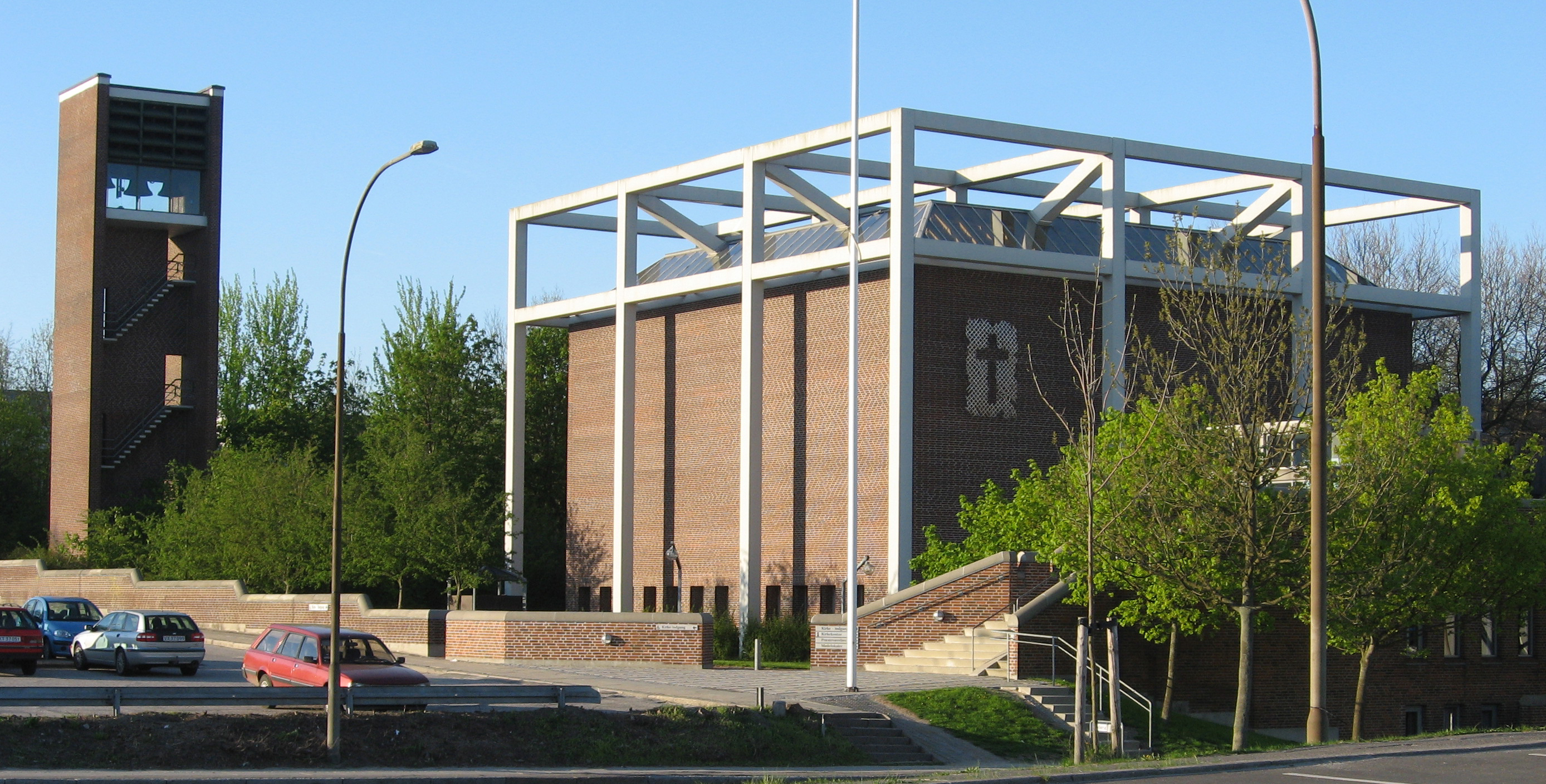 Gellerup Kirke in Gellerup Sogn, Århus, Denmark.